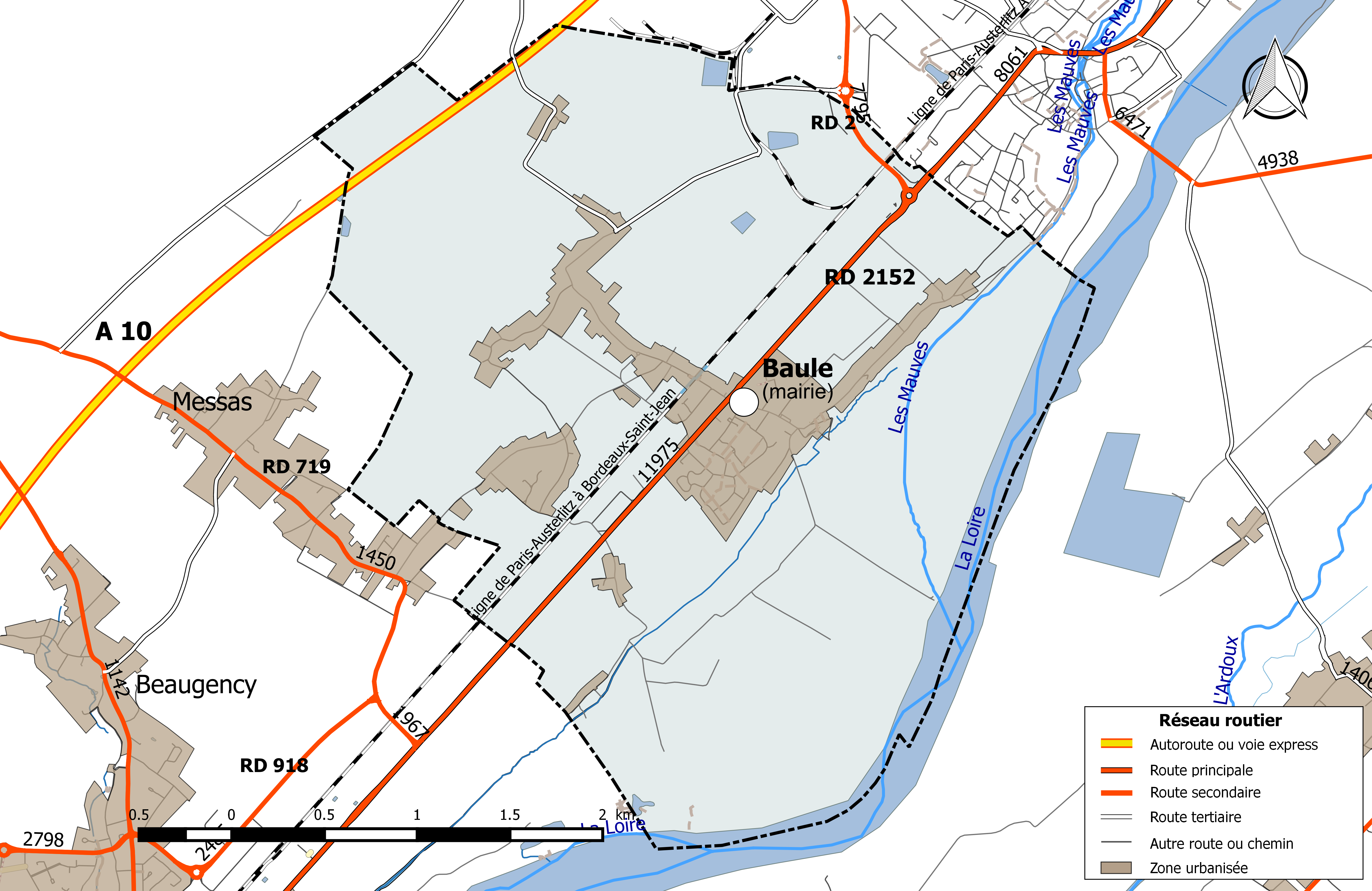 Carte du réseau routier de la commune de Baule.